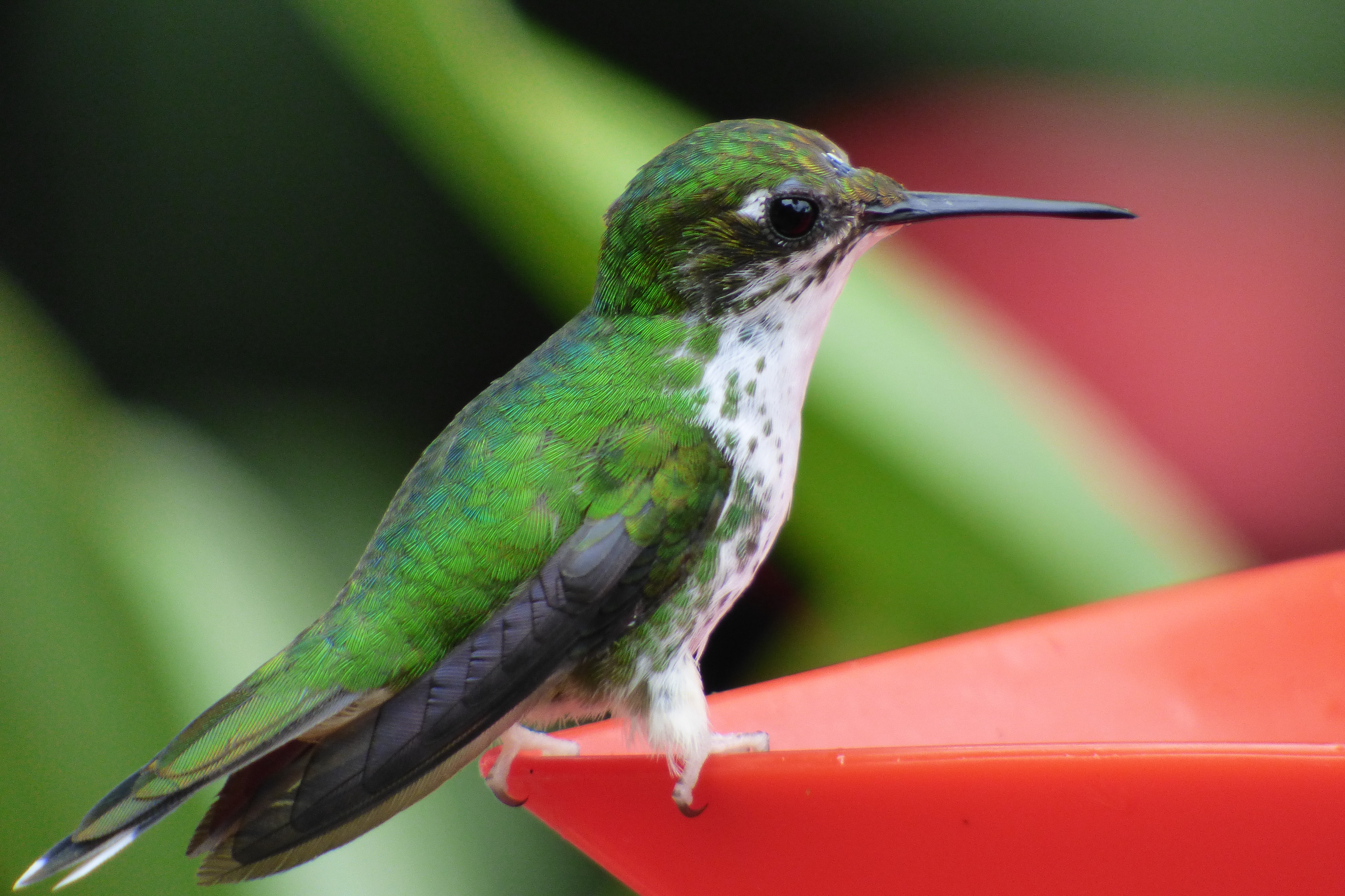 Ocreatus underwoodii (Colibrí cola de raqueta) - Hembra